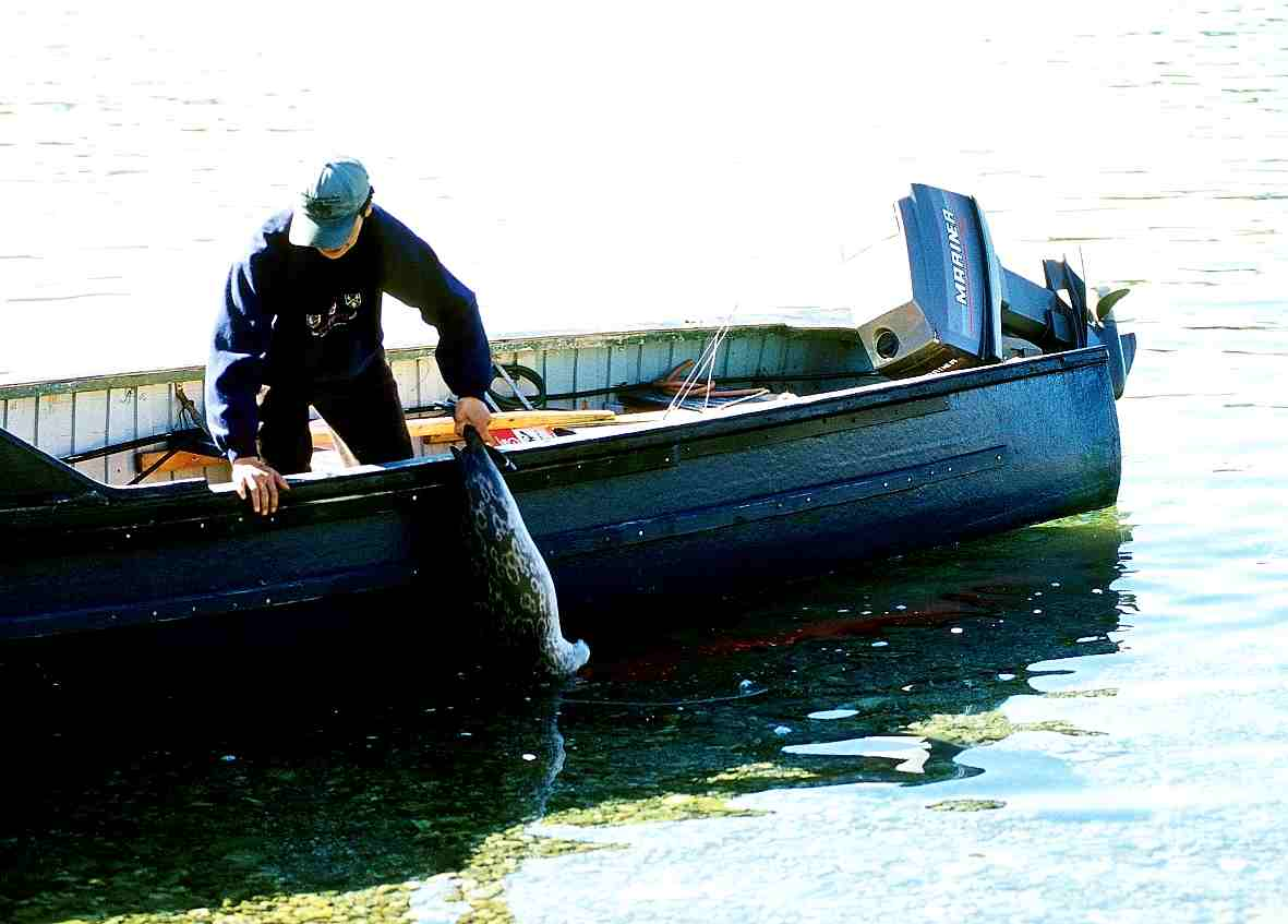 Ringed seal hunting, Baffin Island Eastern Coast, Davis Strait, Nunavut, Canada